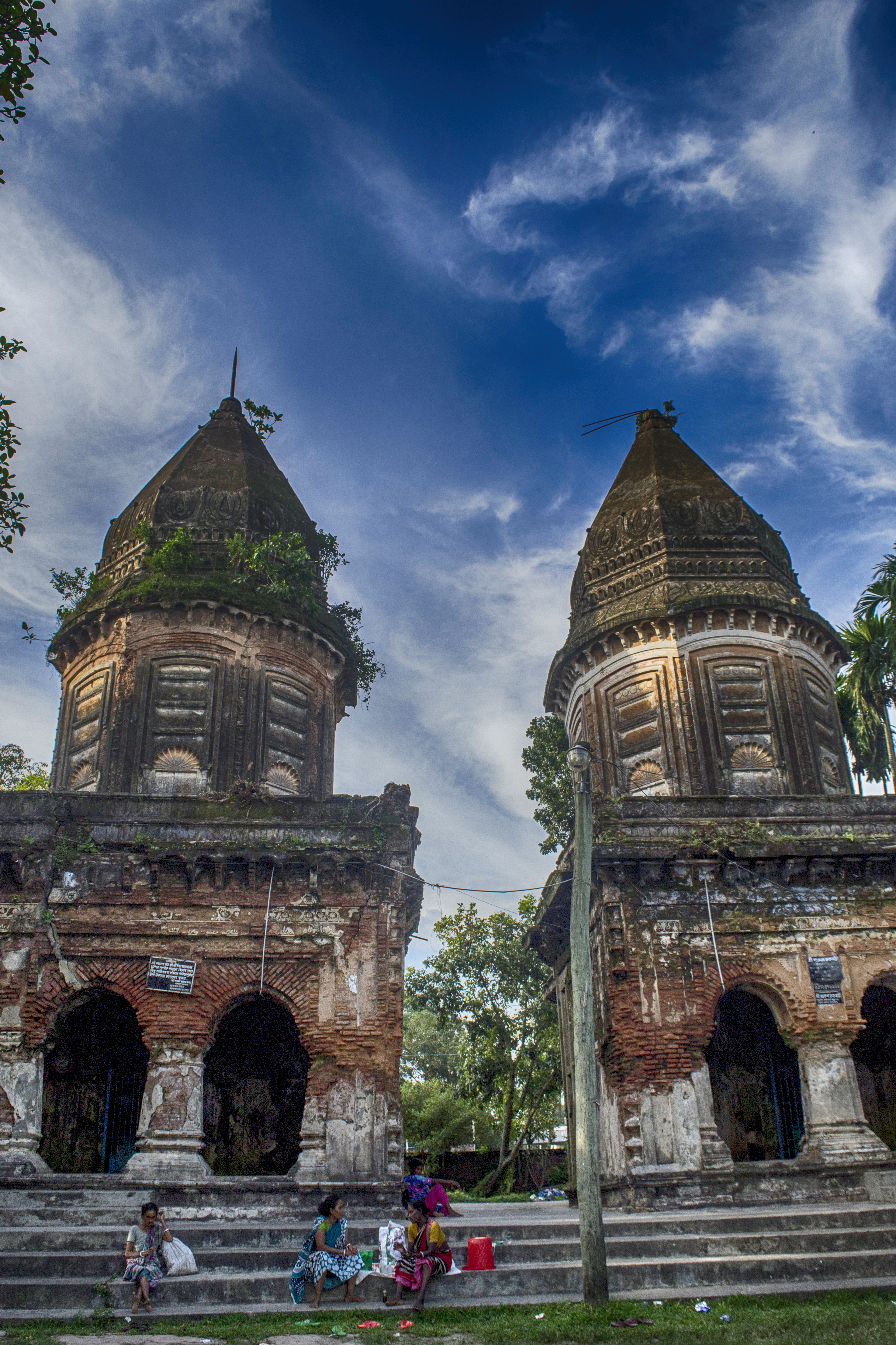 জোড় মন্দির